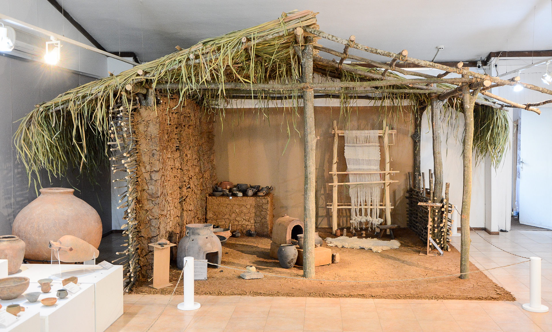 Srpski (latinica): Deo izložbe Tajne arheoloških depoa.